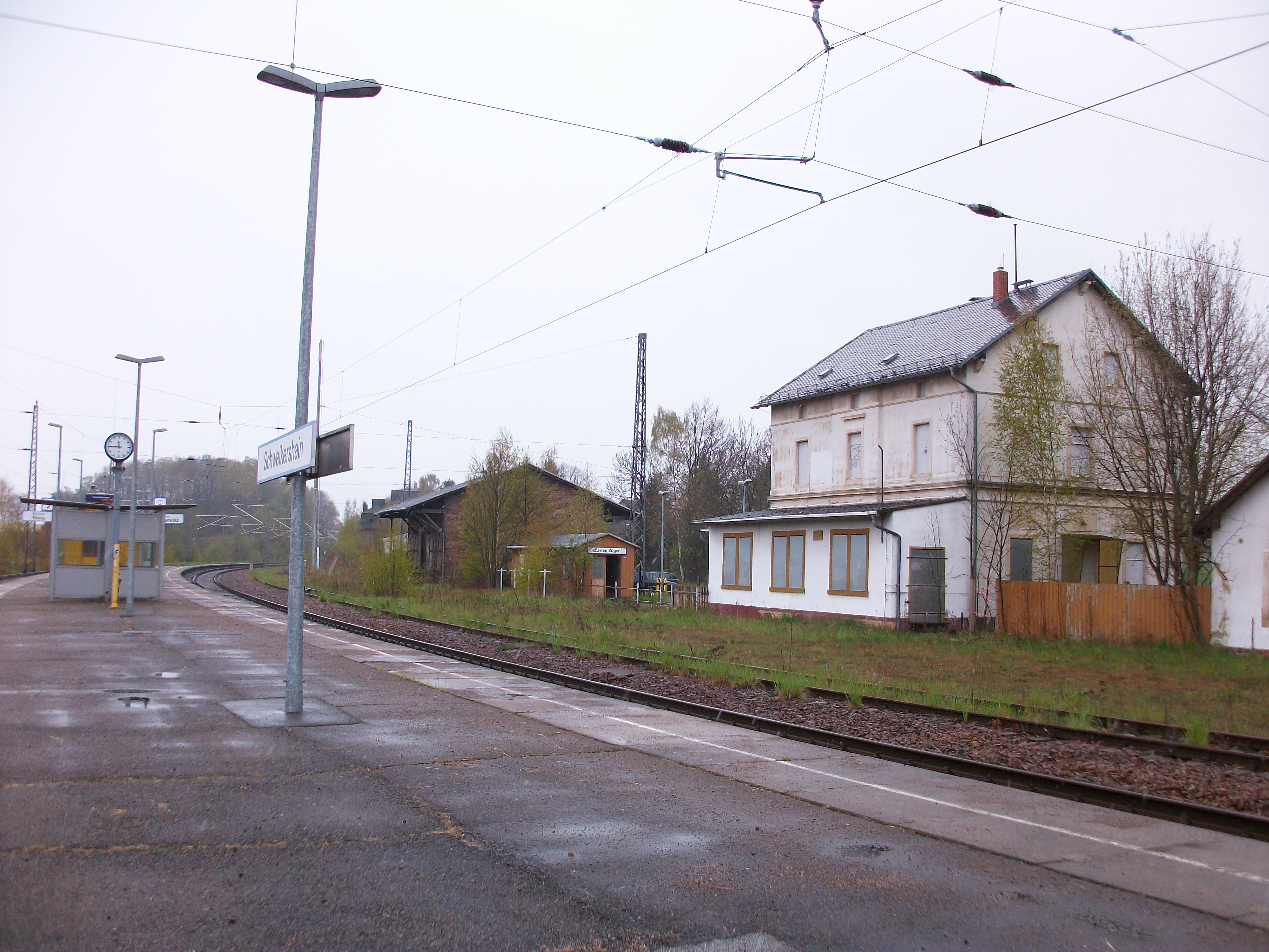 Bahnhof Schweikershain (2016)